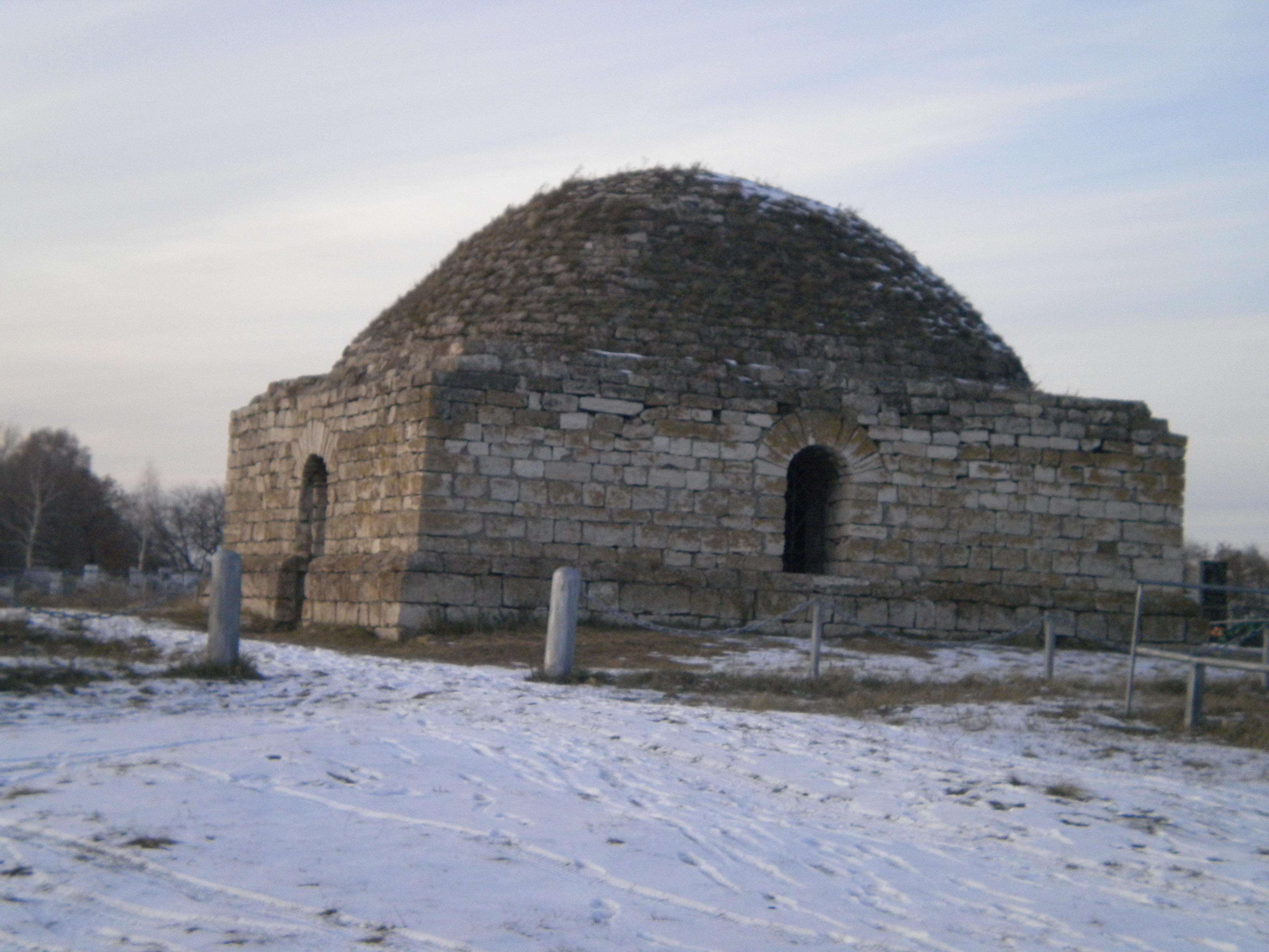 Фотография захоронения Хаджи-Хусейн-бека, распространителя ислама среди башкир в 14 веке